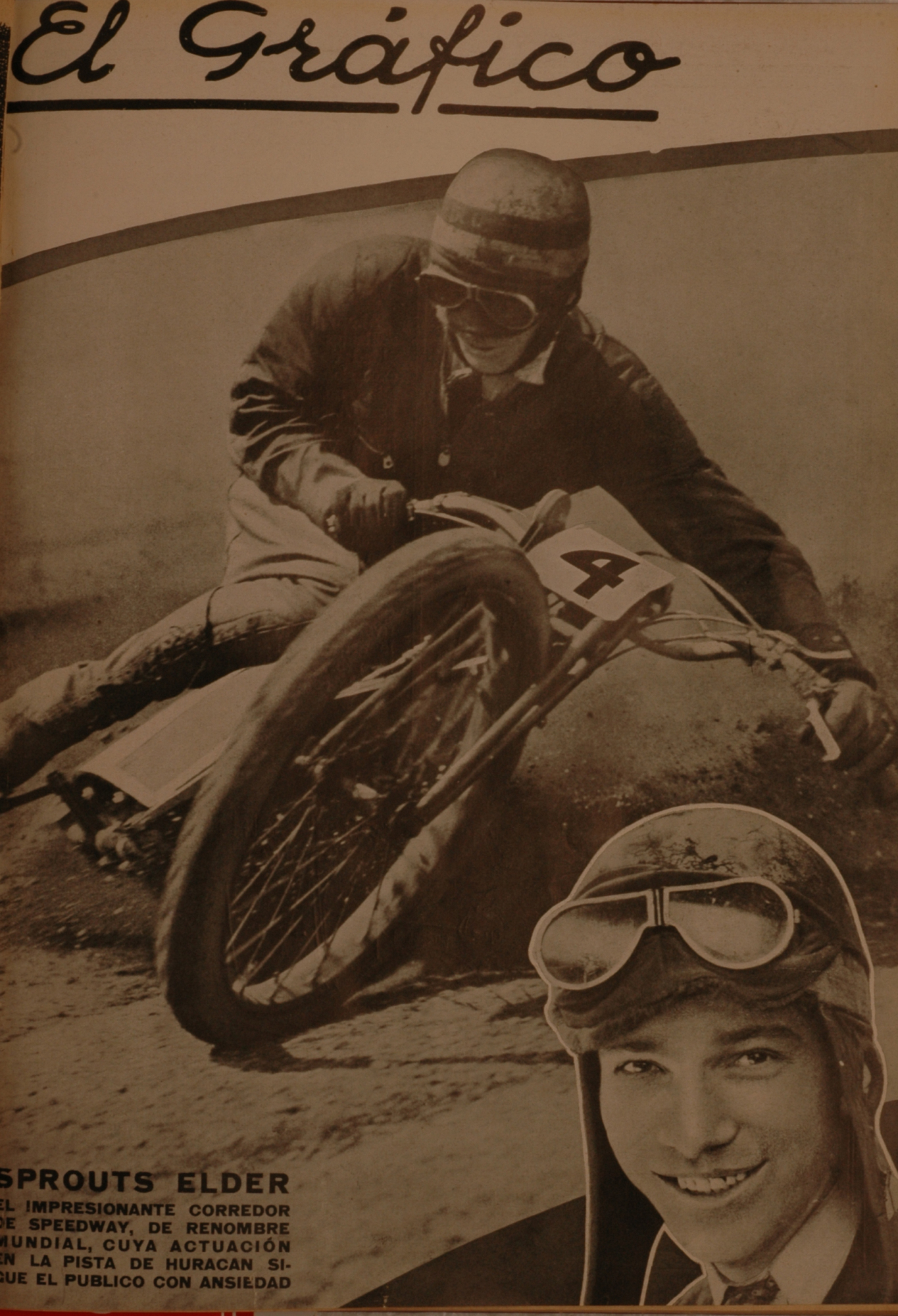 El Grafico del 30 de Noviembre de 1929. Edicion 542